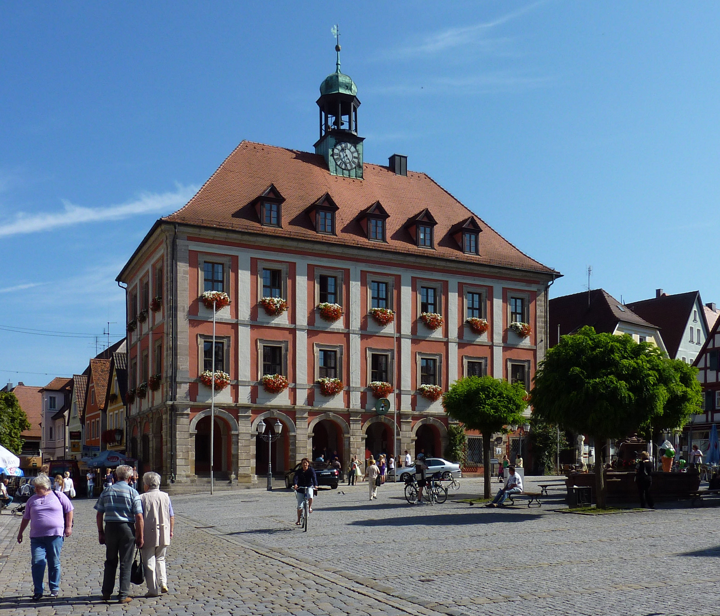 Rathaus in Neustadt an der Aisch